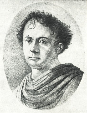 Schicksalsdramatiker Adolf Müllner (1774-1829).